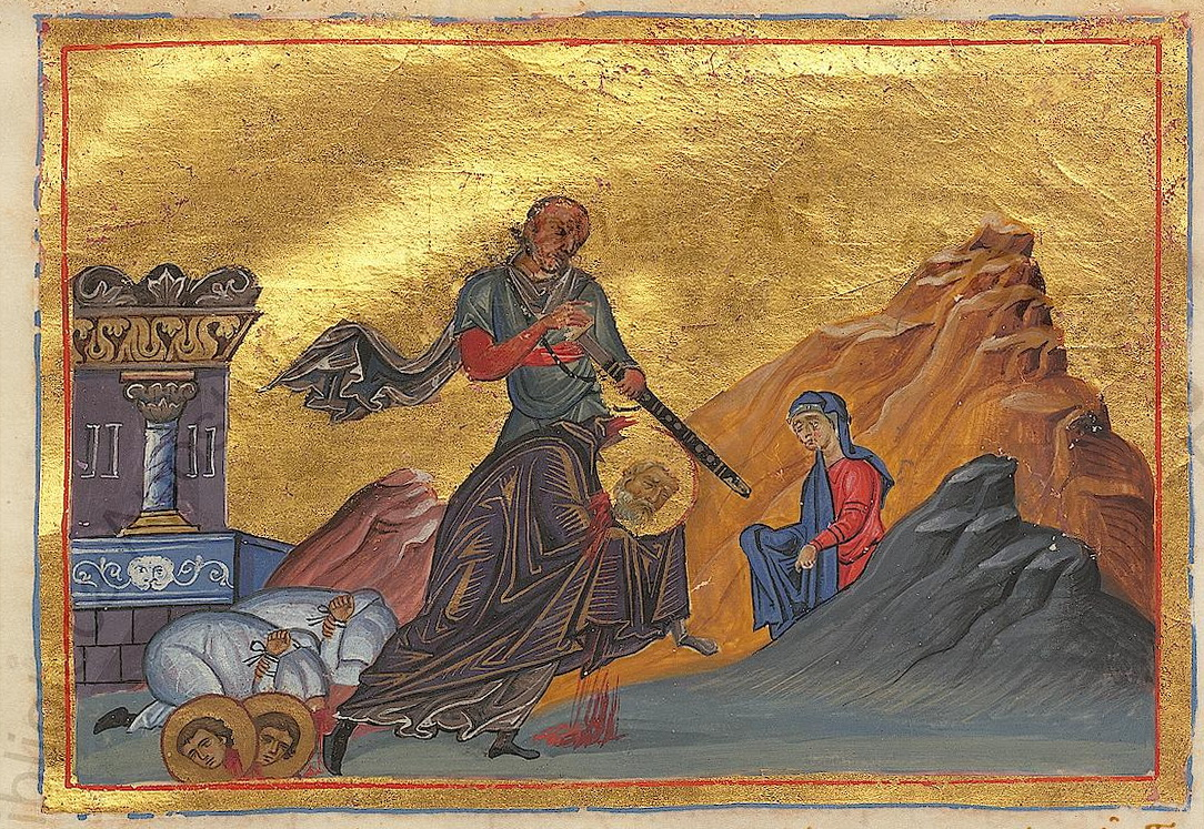 Мученичество святых Дионисия Ареопагита, Рустика и Елевферия. Миниатюра из Минология Василия II. 976–1025 гг. (Vat. gr. 1613. P. 82) // Dionysius the Areopagite, Rusticus and Eleutherius